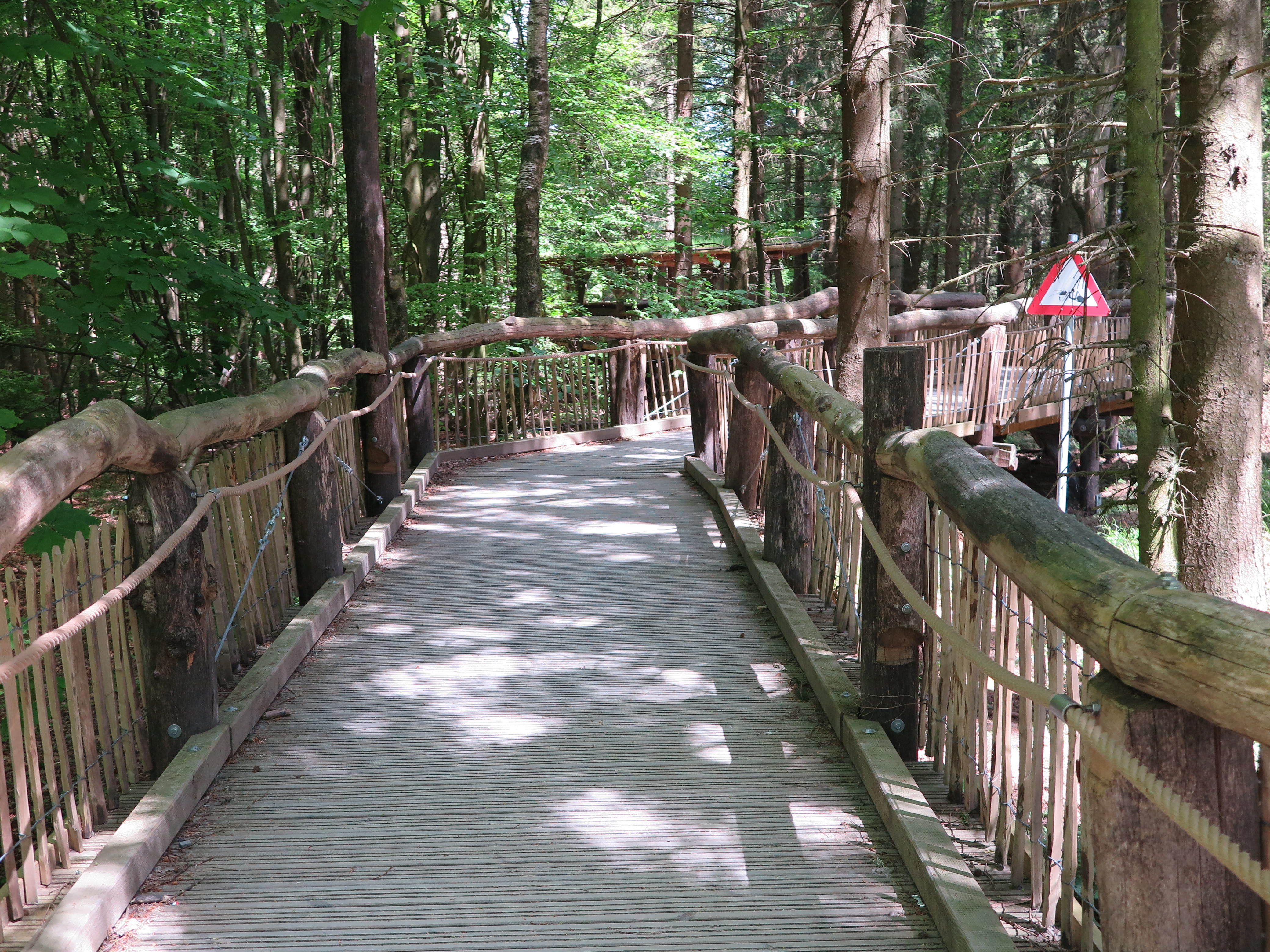 Der „Wilde Weg“ im barrierefreien Naturerlebnisraum „Wilder Kermeter“ im Nationalpark Eifel. Der oberhalb der Wildnis angelegte Pfad soll z.B. Rollstuhlfahrern, Müttern mit Kinderwagen etc. den ungehinderten Zugang zur Natur ermöglichen.